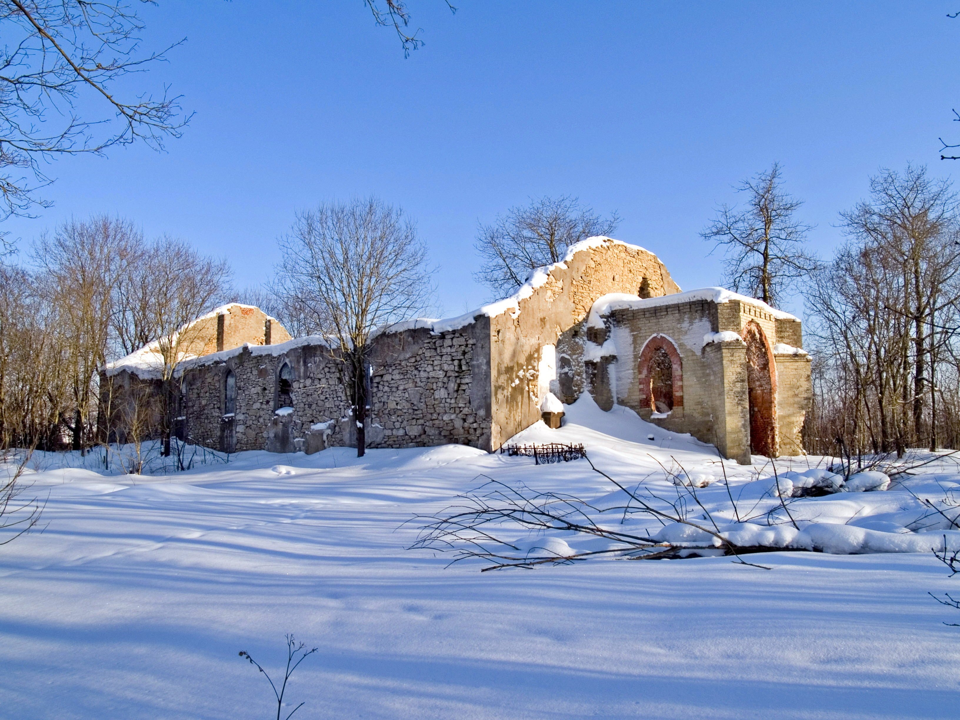 Кирха: Молосковицы, Волосовский район, Ленинградская область